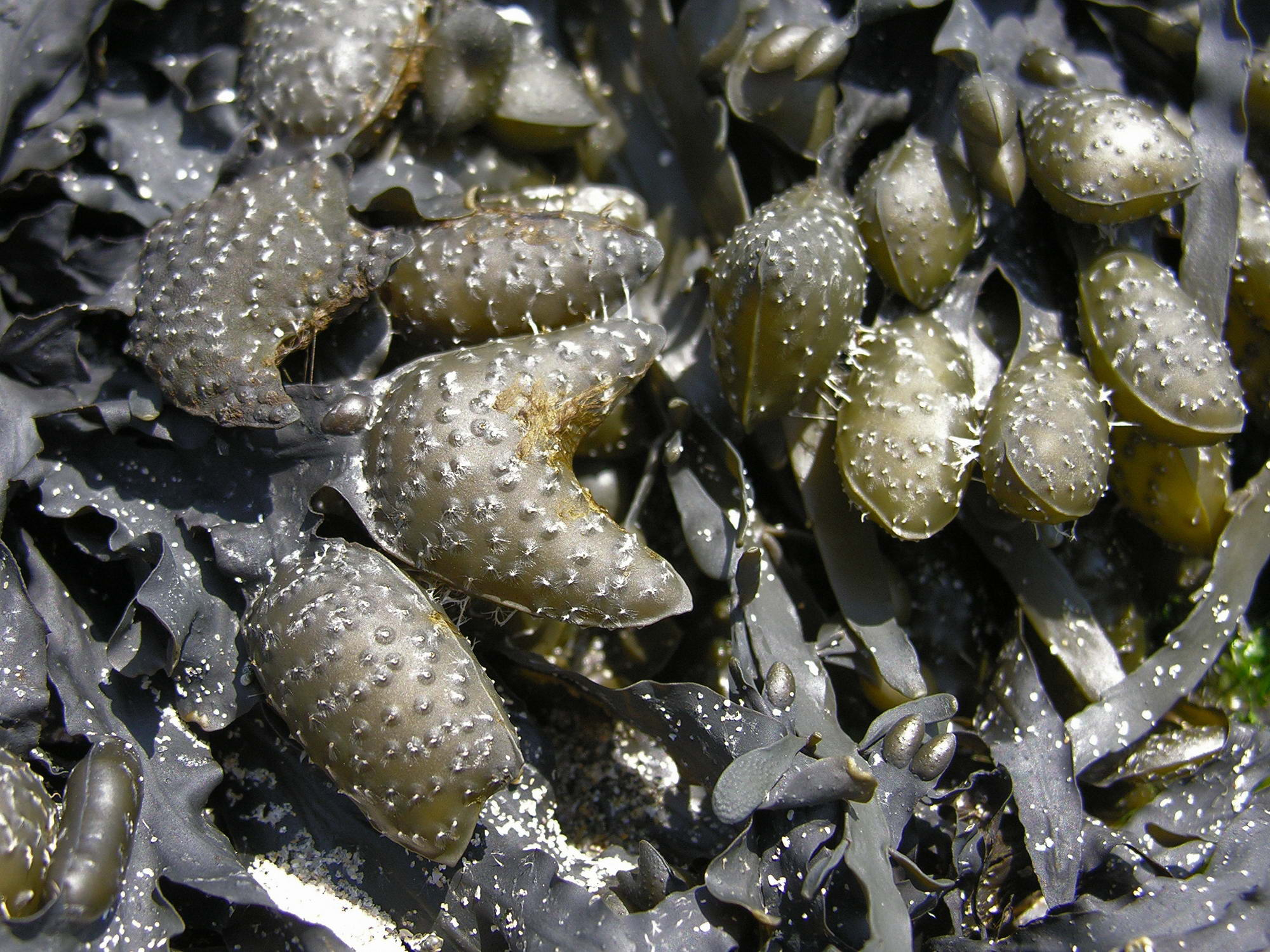 Algas da Praia de Boa, Noia, Galiza, Spain.